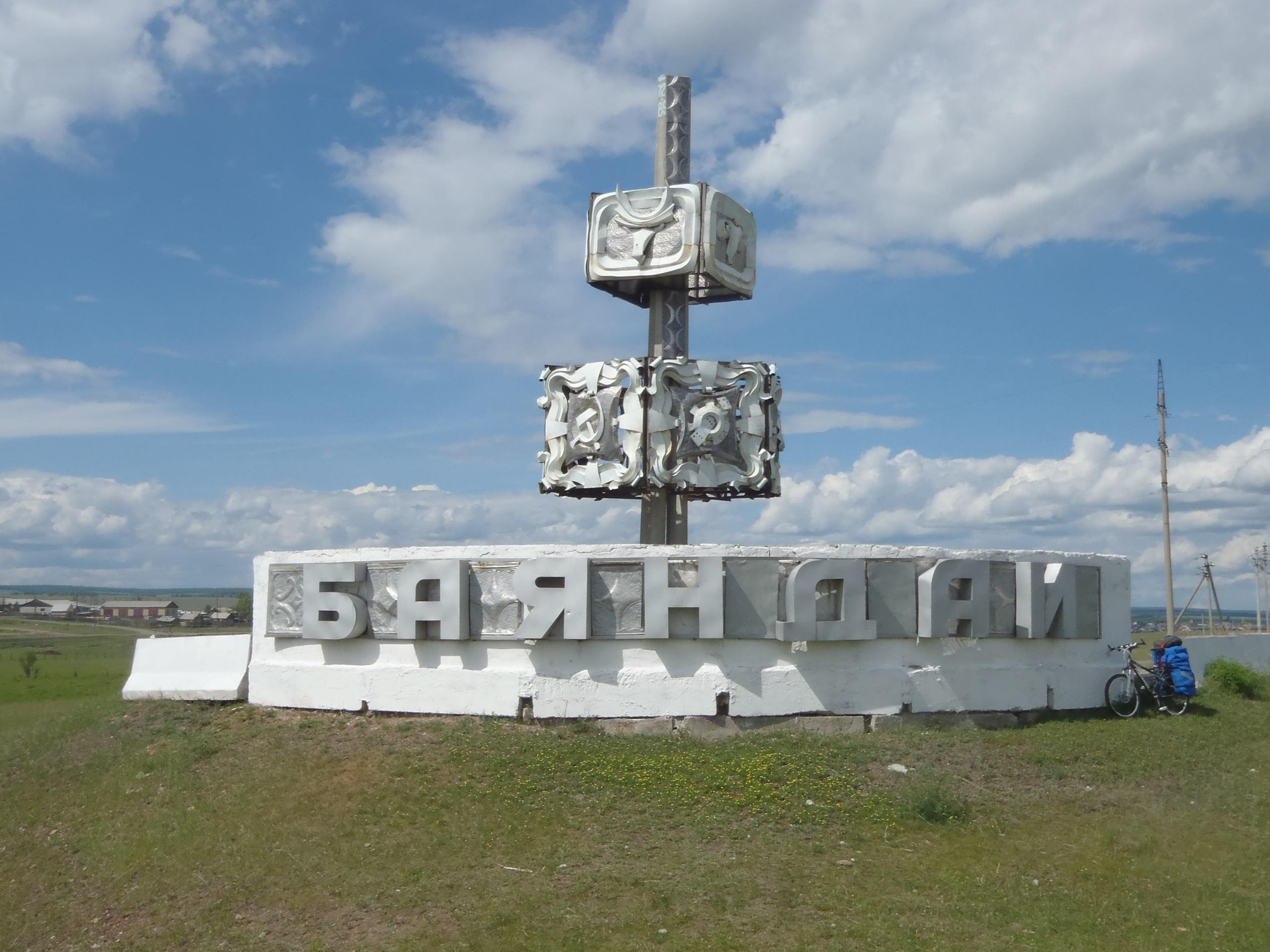 Баяндай